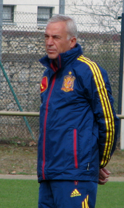 Ignacio Quereda, Trainer der spanischen Frauennationalmannschaft